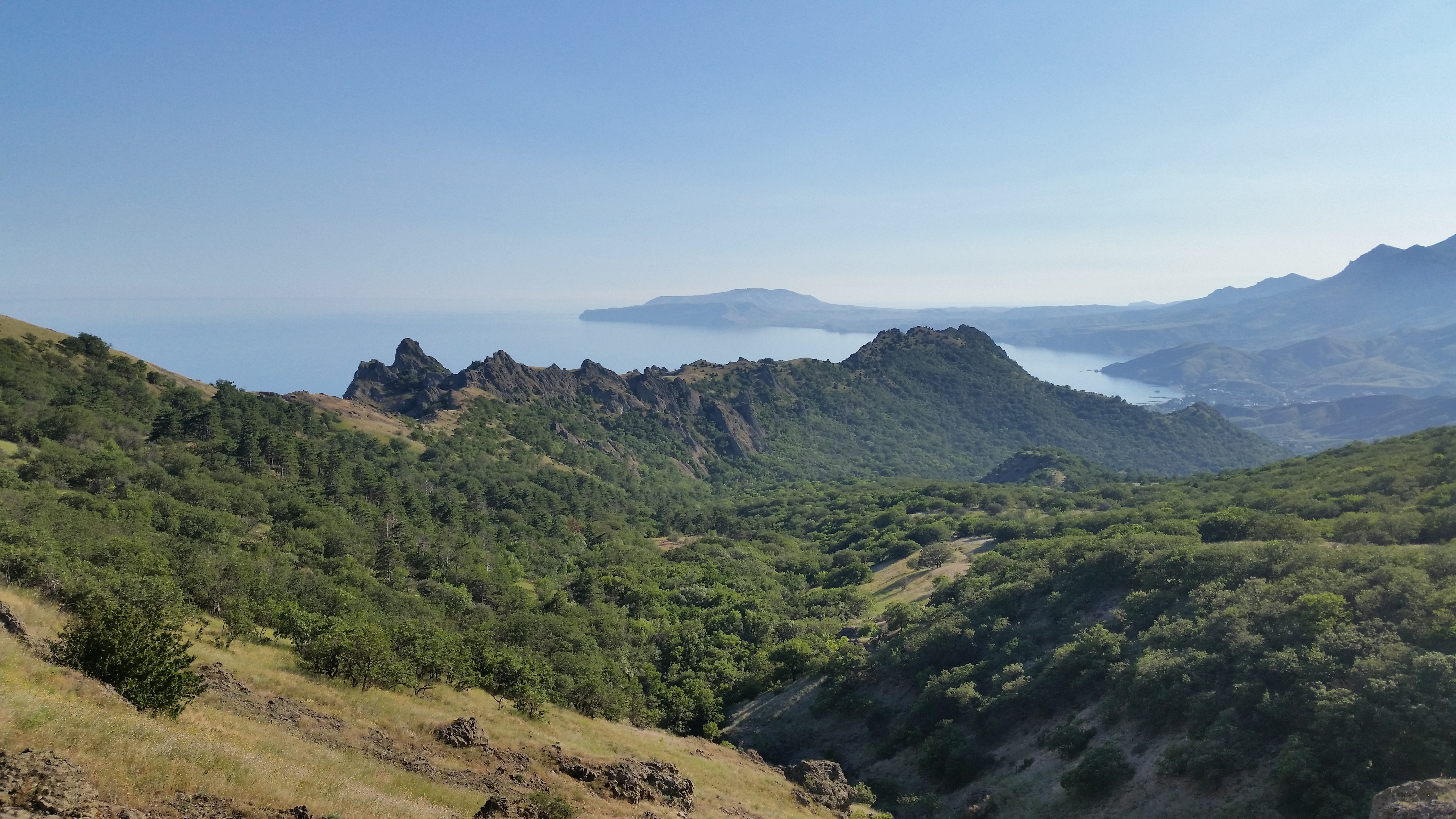 Карадагский заповедник: между Курортным и Коктебелем, Курортное, Феодосия, Крым This object is located on the Crimean Peninsula and recognized as a protected area by both Russia and Ukraine under the ID: 8200005 / 01-116-5002, respectively. The legal status of the Crimean region is currently disputed.